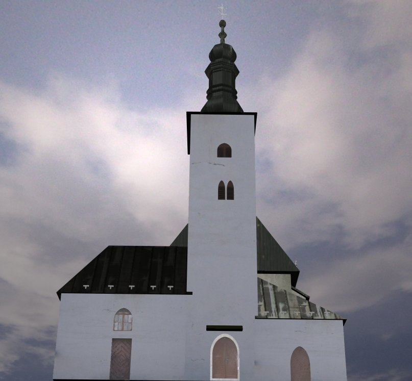 predny pohlad na mariansky kostol v preividzi